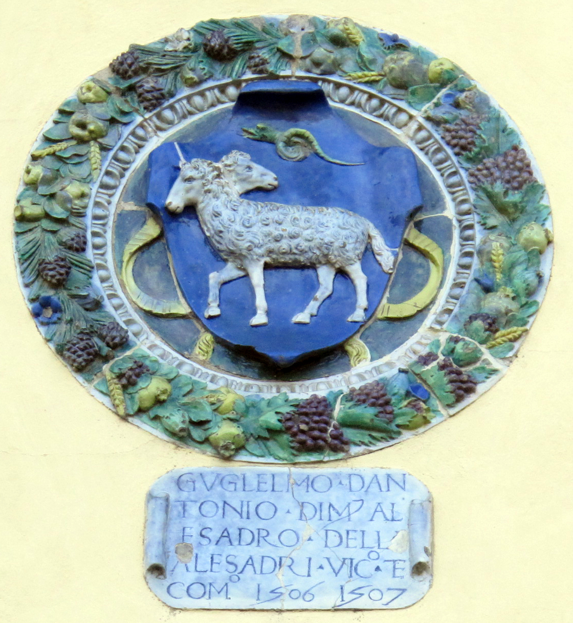 Palazzo d'Arnolfo, stemma guglielmo d'antonio alessandri, 1506-07